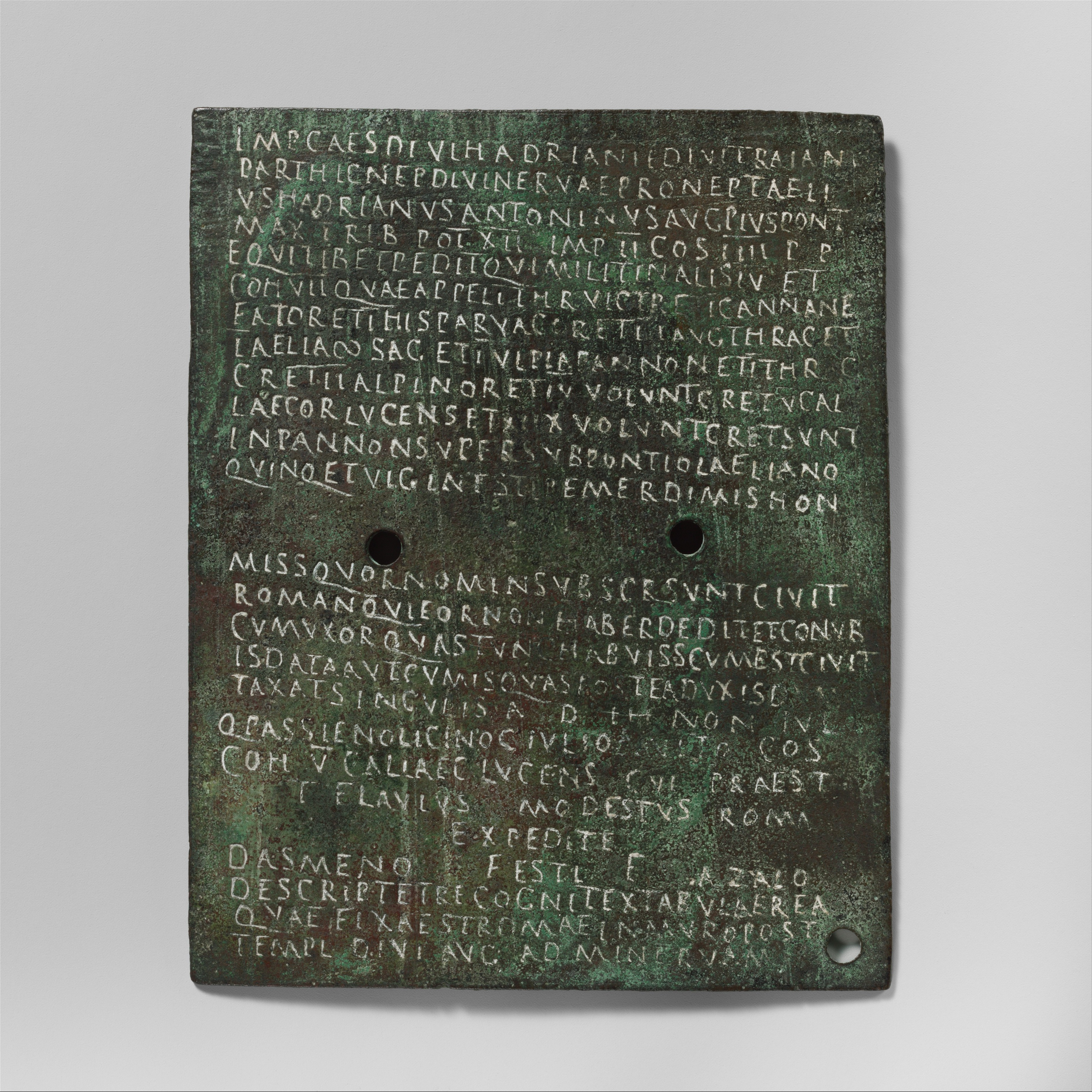 Roman; Military diploma; Bronzes